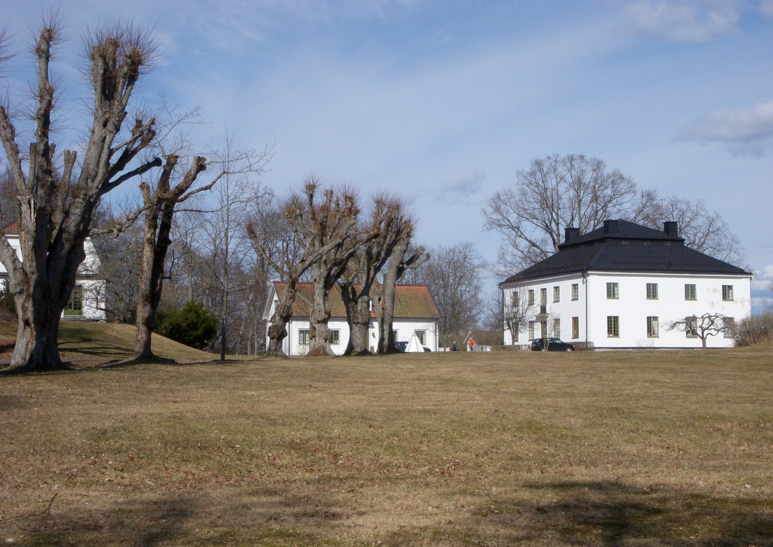 Trångsunds herrgård vid Drevviken, Huddinge kommun